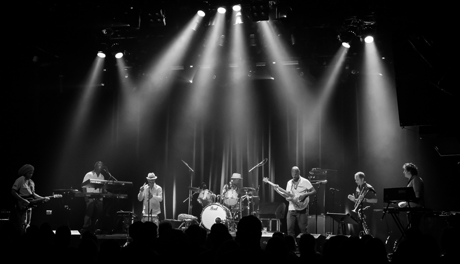 Tony Allen opptrer på Rockefeller under Oslo Jazzfestival 2015. Bandmedlemmer: Tony Allen - Trommer og vokal, Rody Cereyon - Bass, Claude Dibongue - Guitar, Jean Phi Dary - Keys, Valentin Pellet - Trompet, Yann Jankielewicz - Sax and Keys, Patrick Gorce - Perkusjon